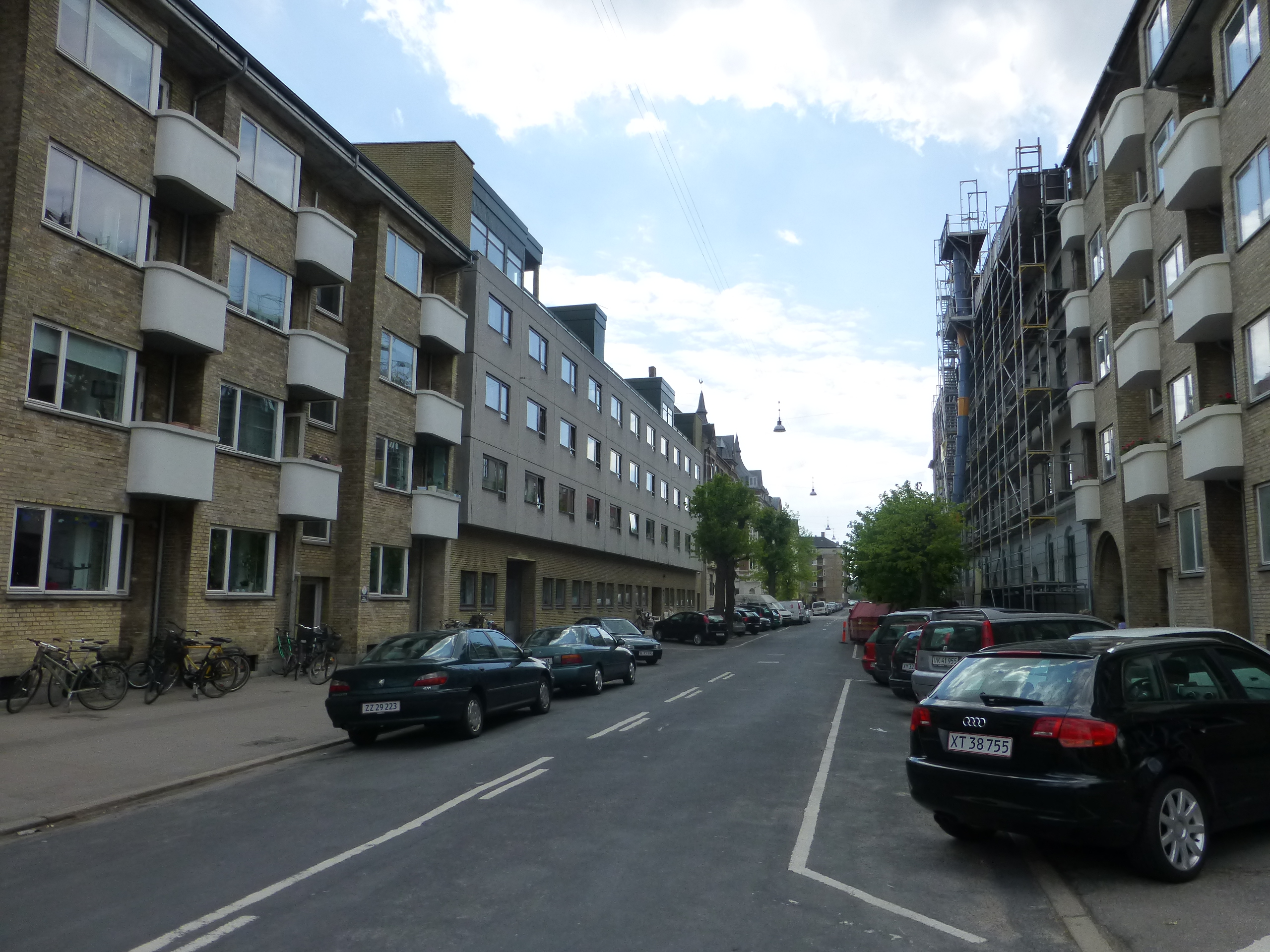 The street Helsingborggade in Østerbro in Copenhagen.